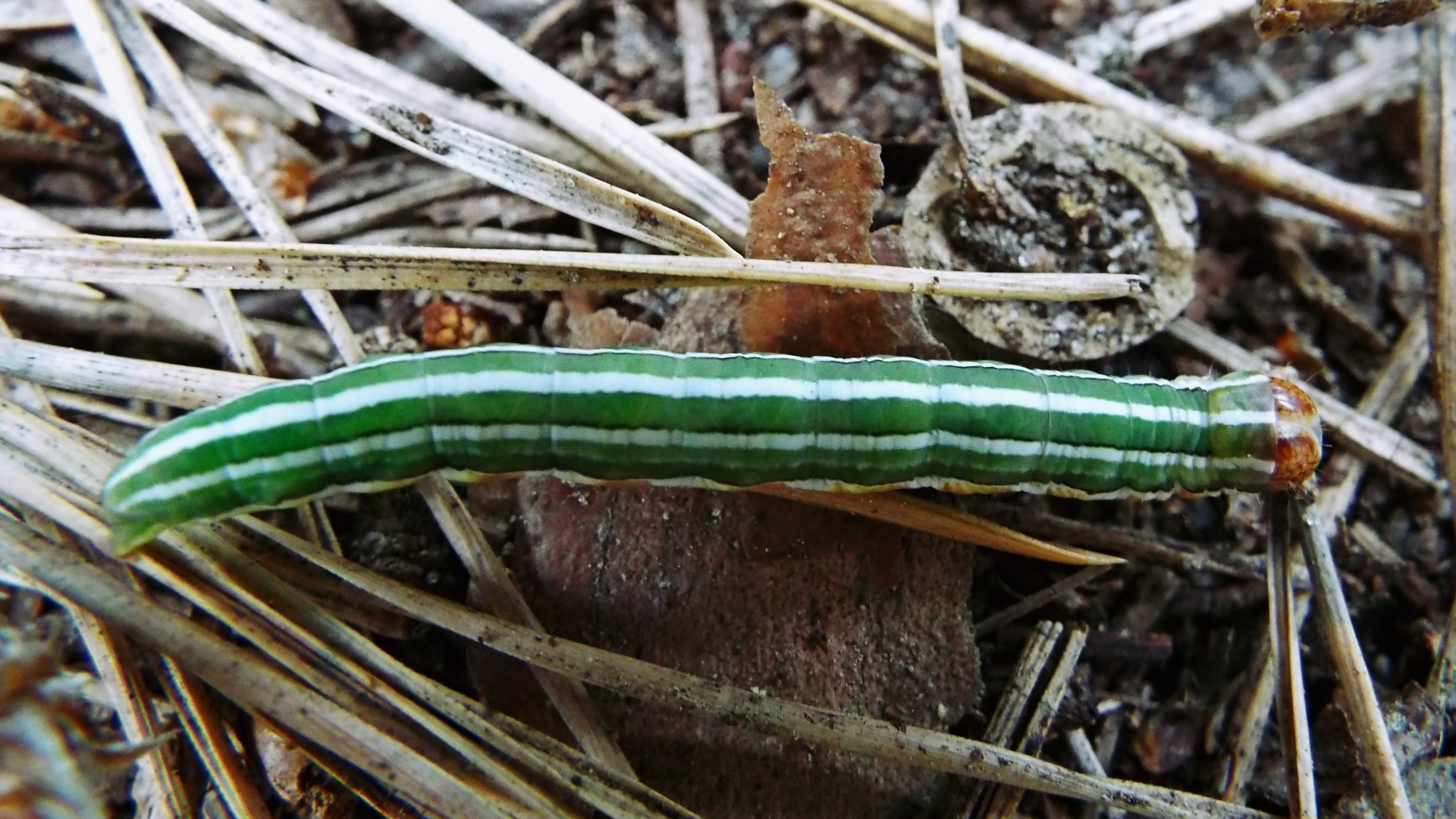 Strzygonia choinówka (Panolis flammea), gąsienica; Klempicz, Puszcza Notecka, Polska (Poland)